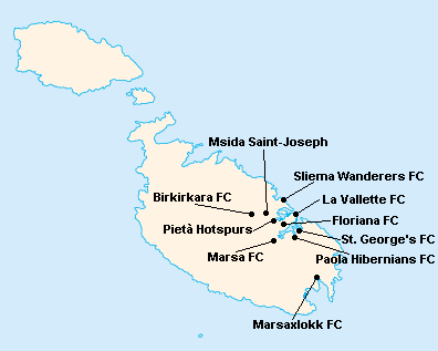 Répartition des clubs de Premier League Maltaise 2006-2007.